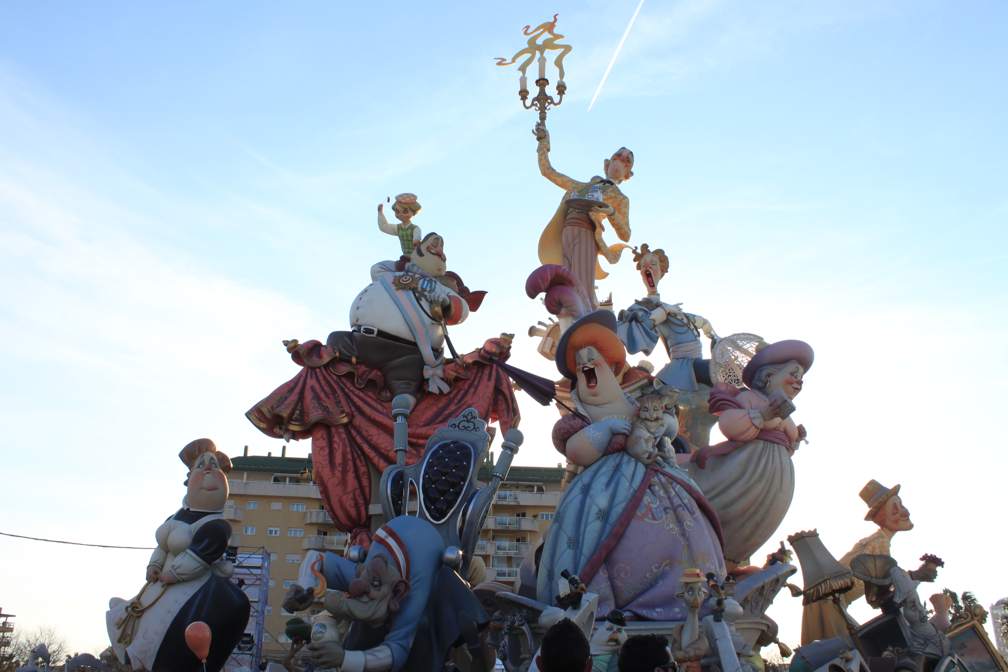 Falla Pediatra J. Comín-Serra Calderona Nou Campanar 2012, Valencia